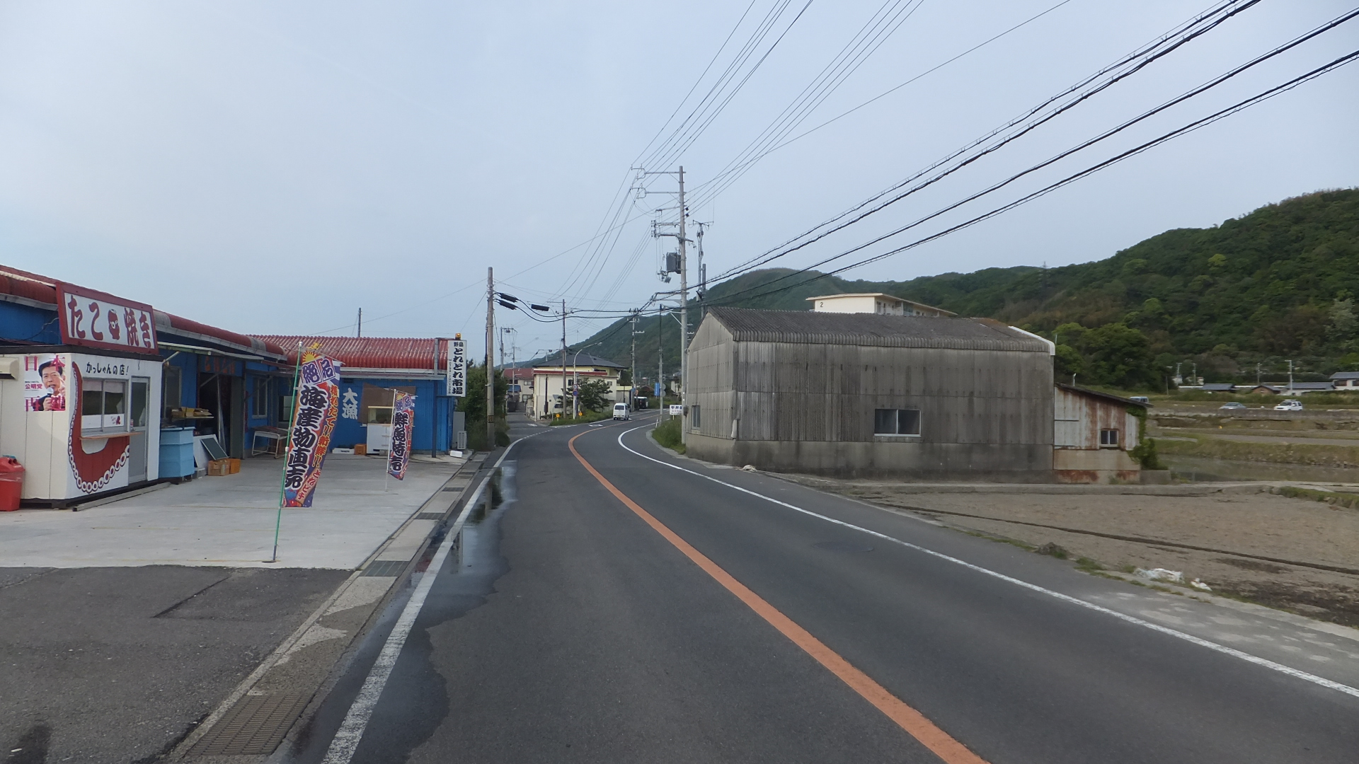 兵庫県淡路市野島蟇浦 兵庫県道31号福良江井岩屋線